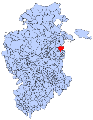 Cerezo de Río Tirón en Burgos